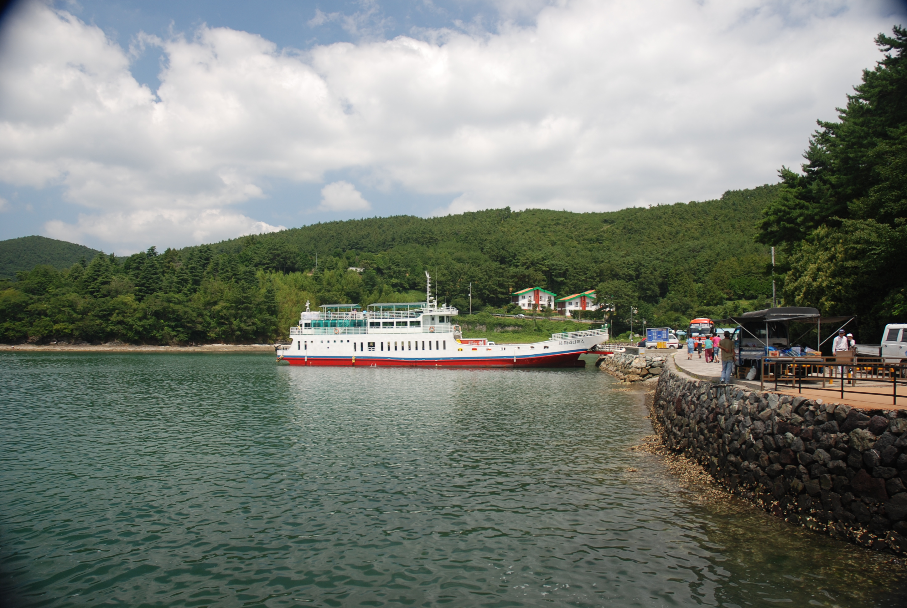 한산도 카페리